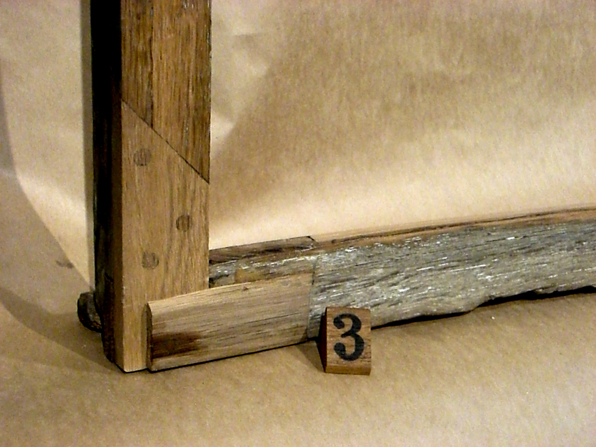 Fensterrestaurierung mit minimalem Eingriff in die Substanz.